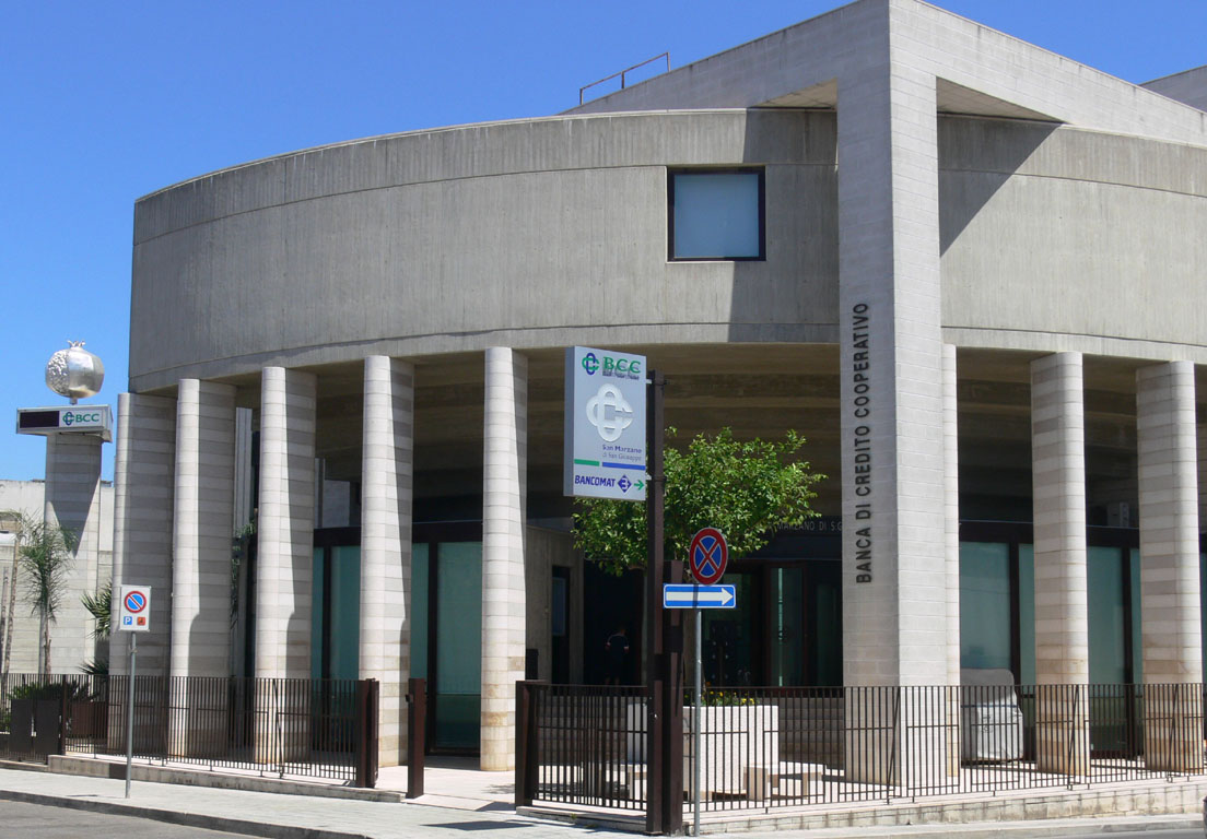 La sede della Presidenza e della Direzione Generale della BCC San Marzano di San Giuseppe in provincia di Taranto (Italy)